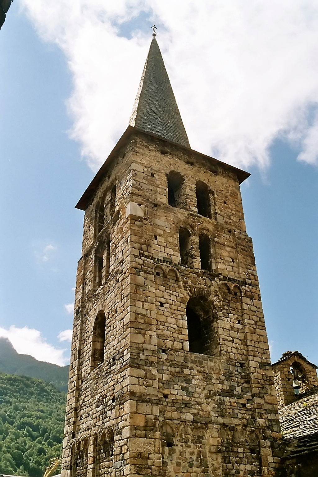 Espagne - Val d'Aran - Église de l'Assomption de Bossòst